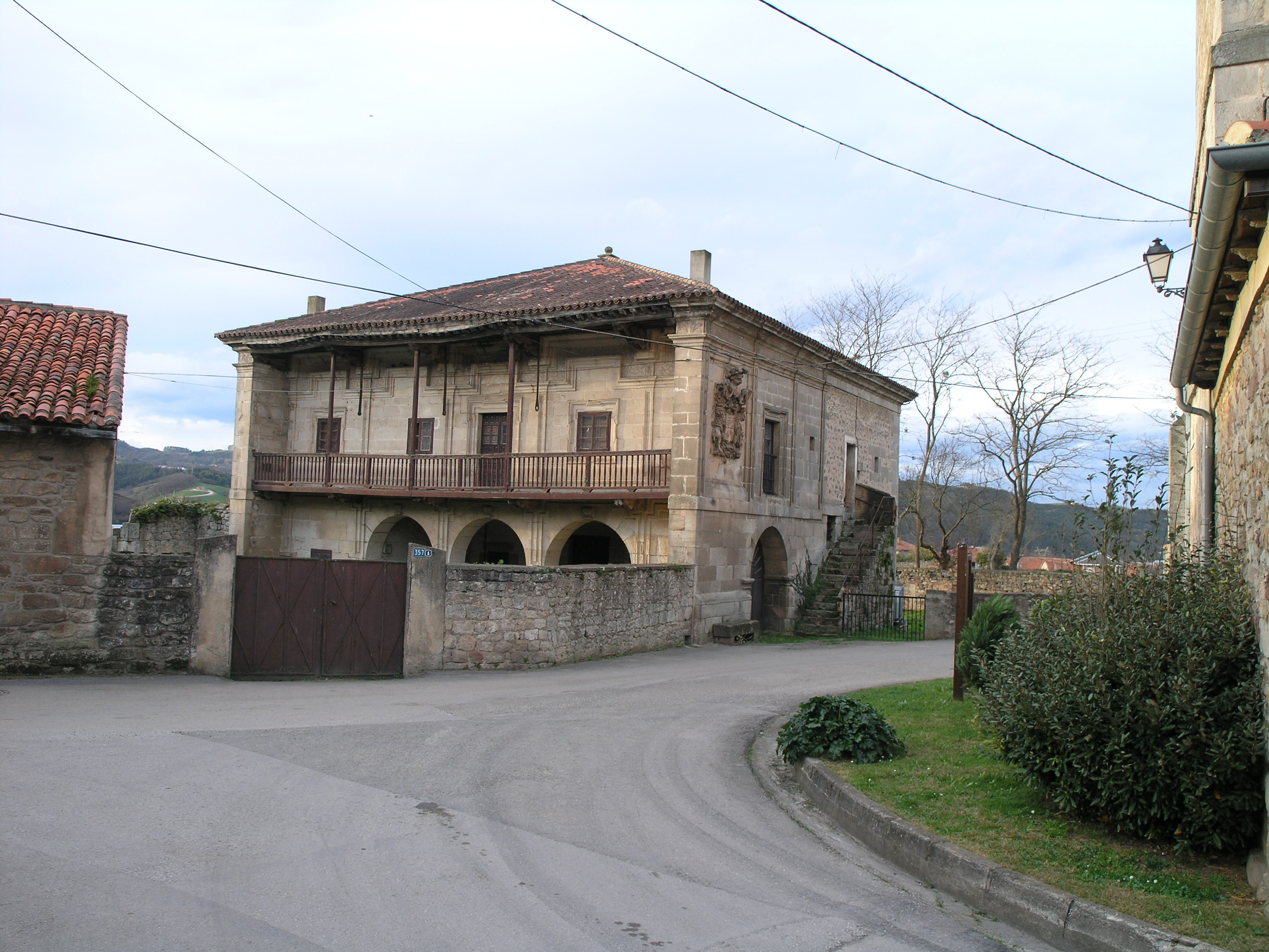 Casa de Sánchez de Bustamante, en el Barrio de Paramenes de Viérnoles, en el municipio de Torrelavega, Cantabria, España. Casona del siglo XVIII.